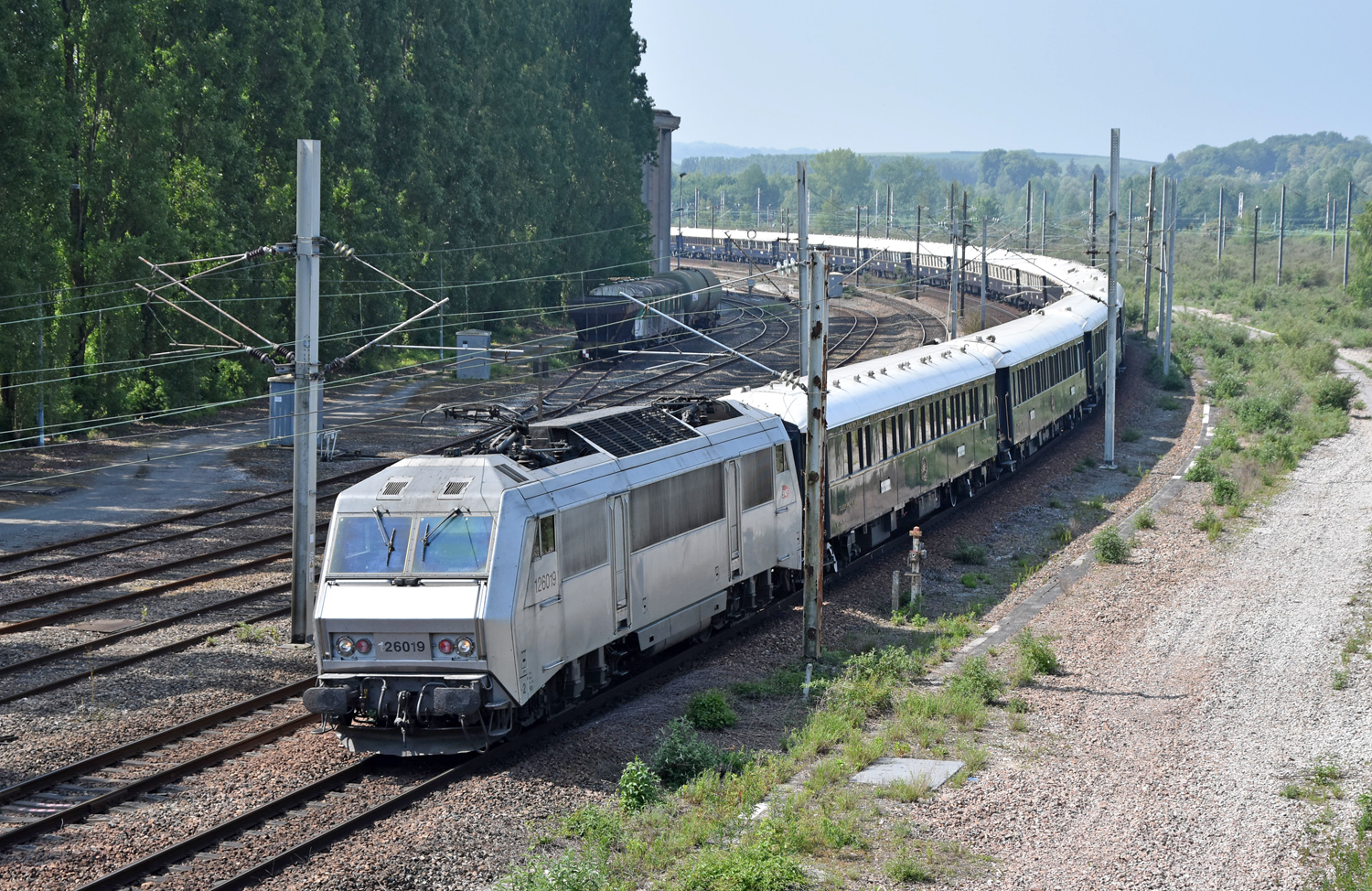 BB 26019 en tête du Venise Simplon Orient-Espress à Longueau